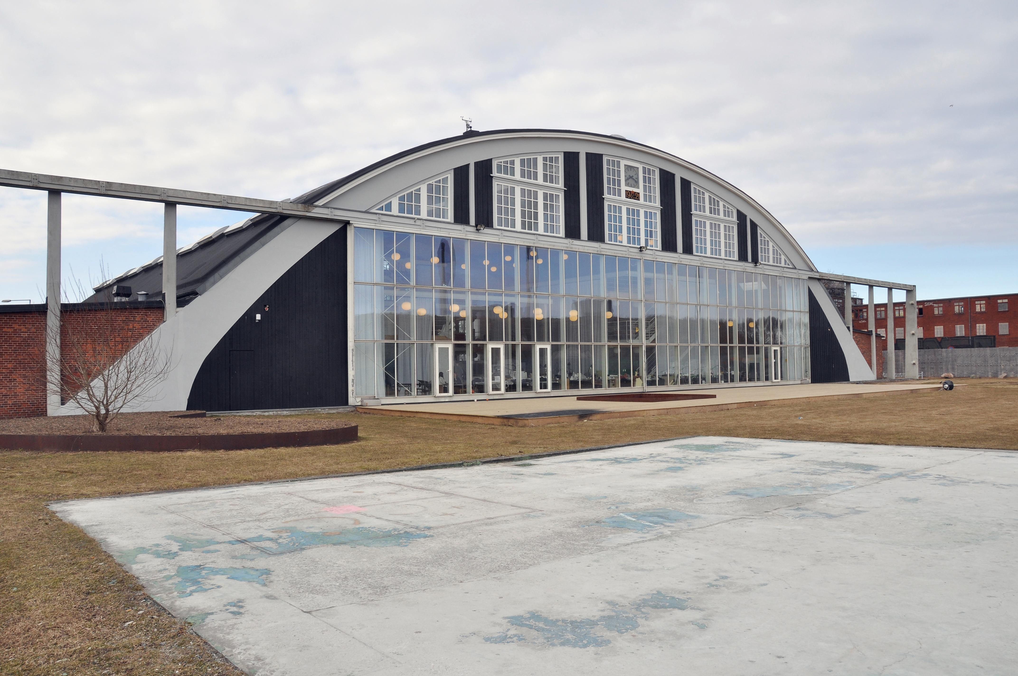 Hangar H on Margretheholm in Copenhagen, Denmark